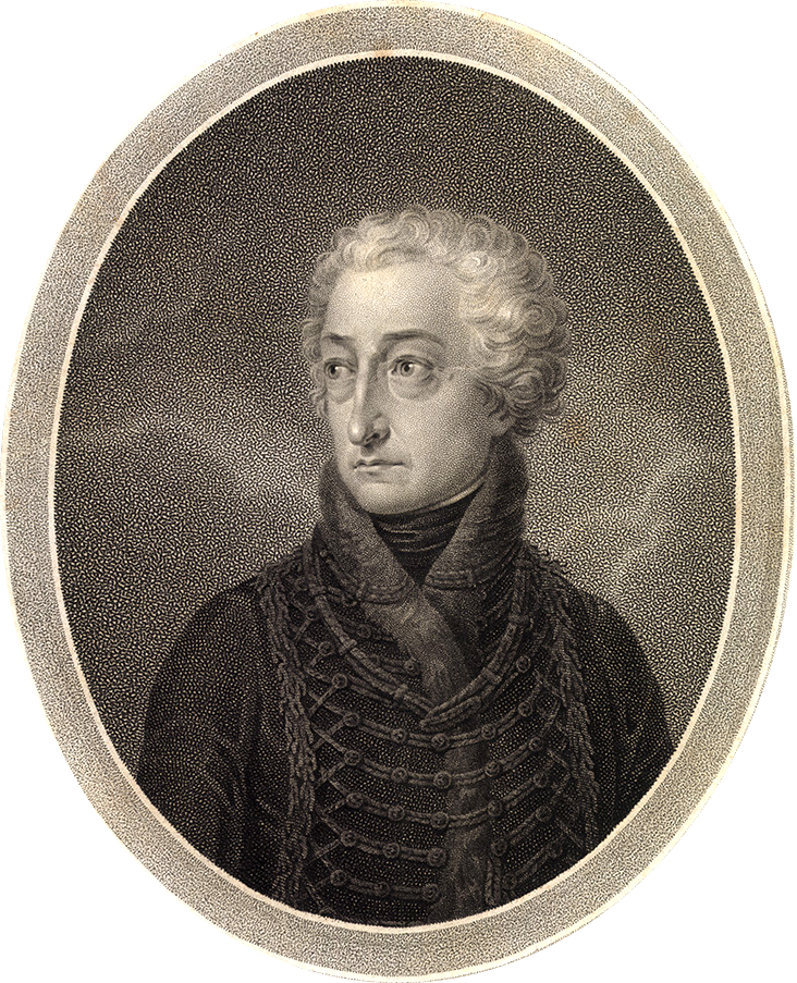 Festetics György (1755–1819) nagybirtokos, a göttingeni tudós társaság levelező tagja, a keszthelyi Georgikon és Helikon alapítója